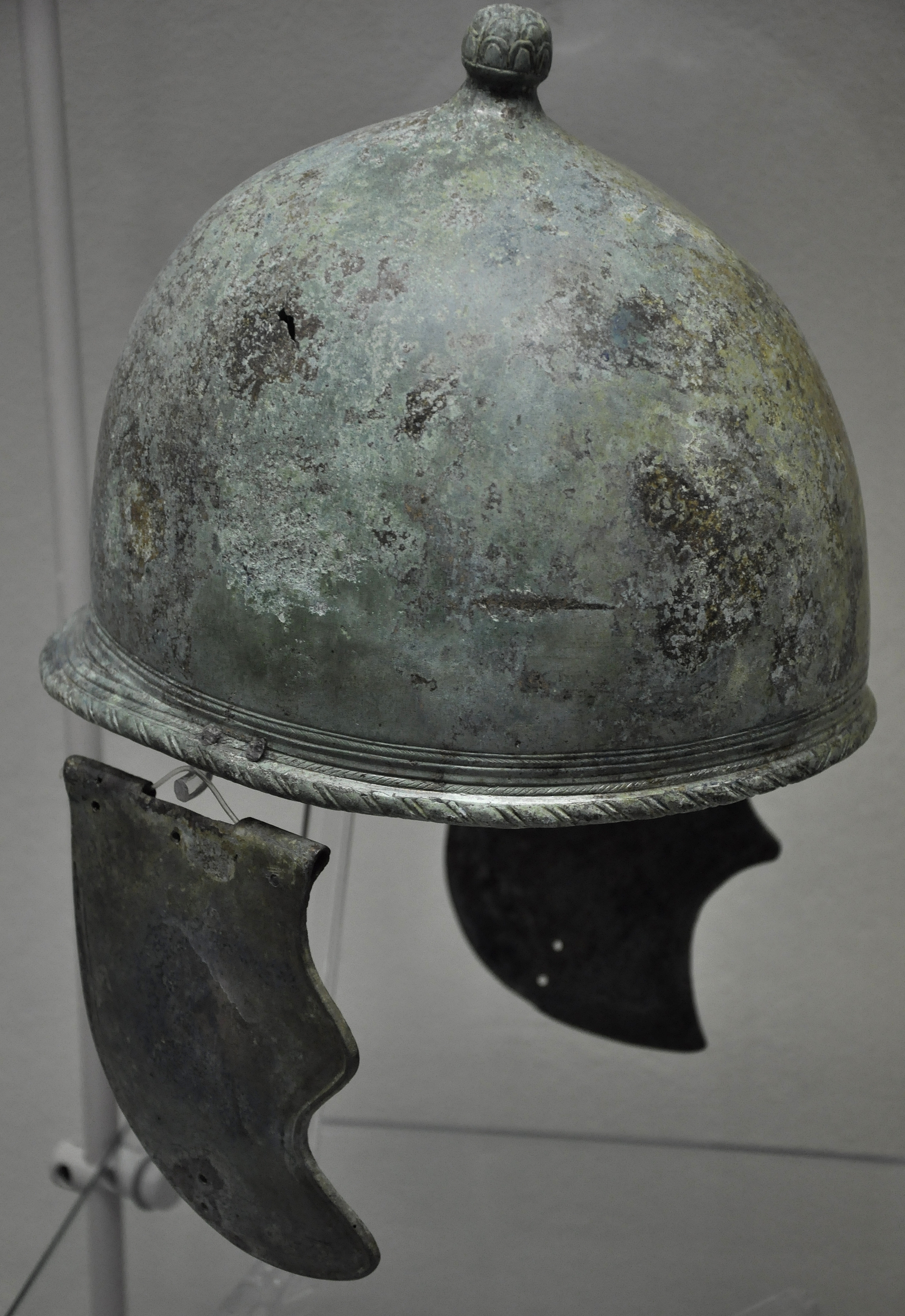 Een btonzen Etruskische helm van de necropole Benacci in het Museo Civico Archeologico te Bologna